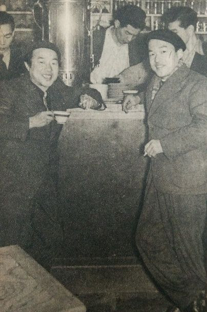 横山隆一（左）・泰三（右）兄弟